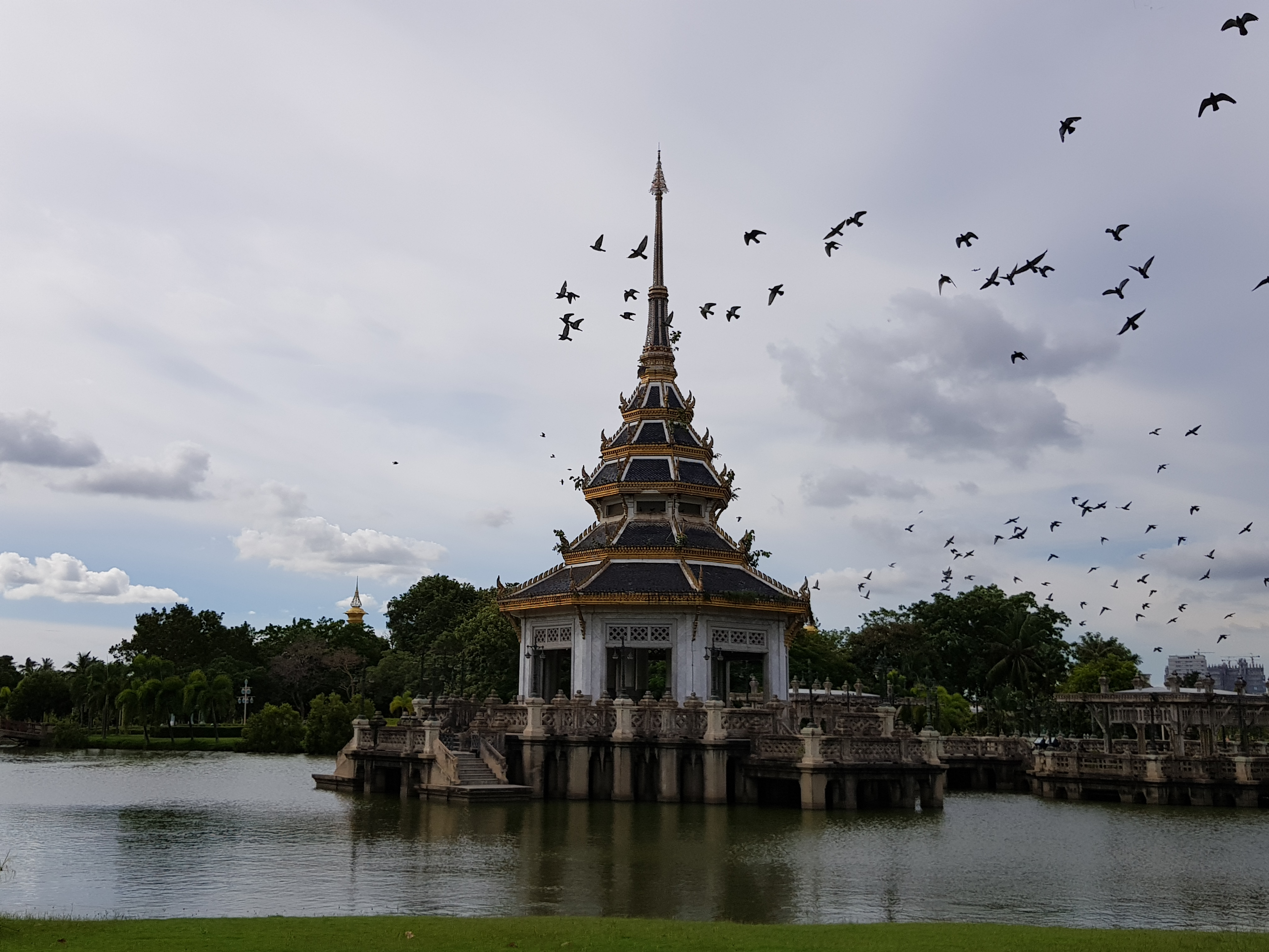 สวนภูมิรักษ์แห่งนี้ เป็น 1 ในพื้นที่เป้าหมายทั้งหมด 6 แห่งทั่วประเทศ ที่ ปตท.ร่วมกับสถาบันสิ่งแวดล้อมไทย ดำเนินการจัดสร้างเป็นพื้นที่นำร่อง ในลักษณะสวนป่าสาธิตที่เหมือนธรรมชาติขนาดเล็กตามความเหมาะสมของพื้นที่โดยมีวัตถุประสงค์เพื่อเพิ่มพื้นที่สีเขียวหรือปอดธรรมชาติให้กับชุมชนในเขตเมือง